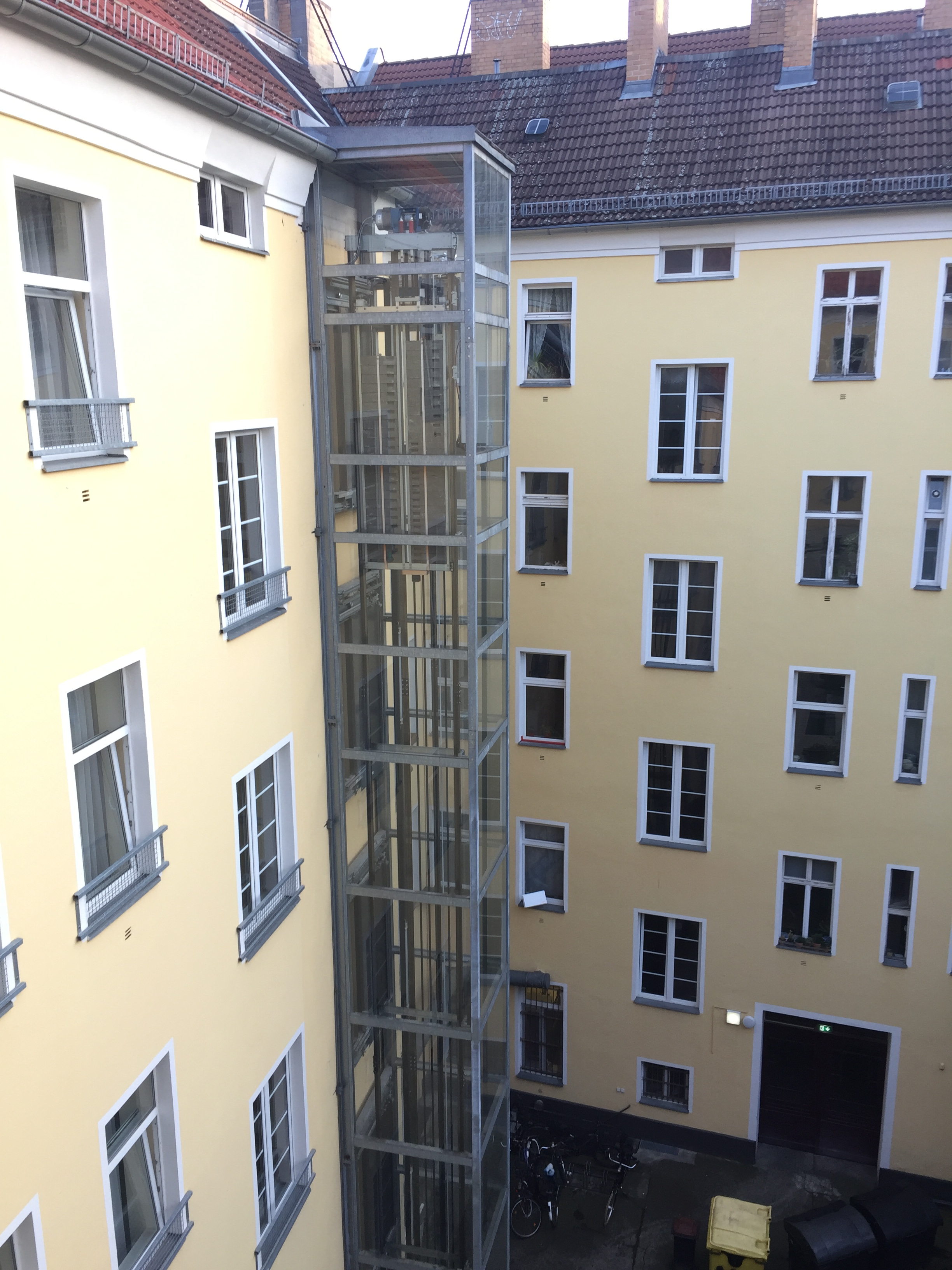 Fahrstuhl an Aussenfassade